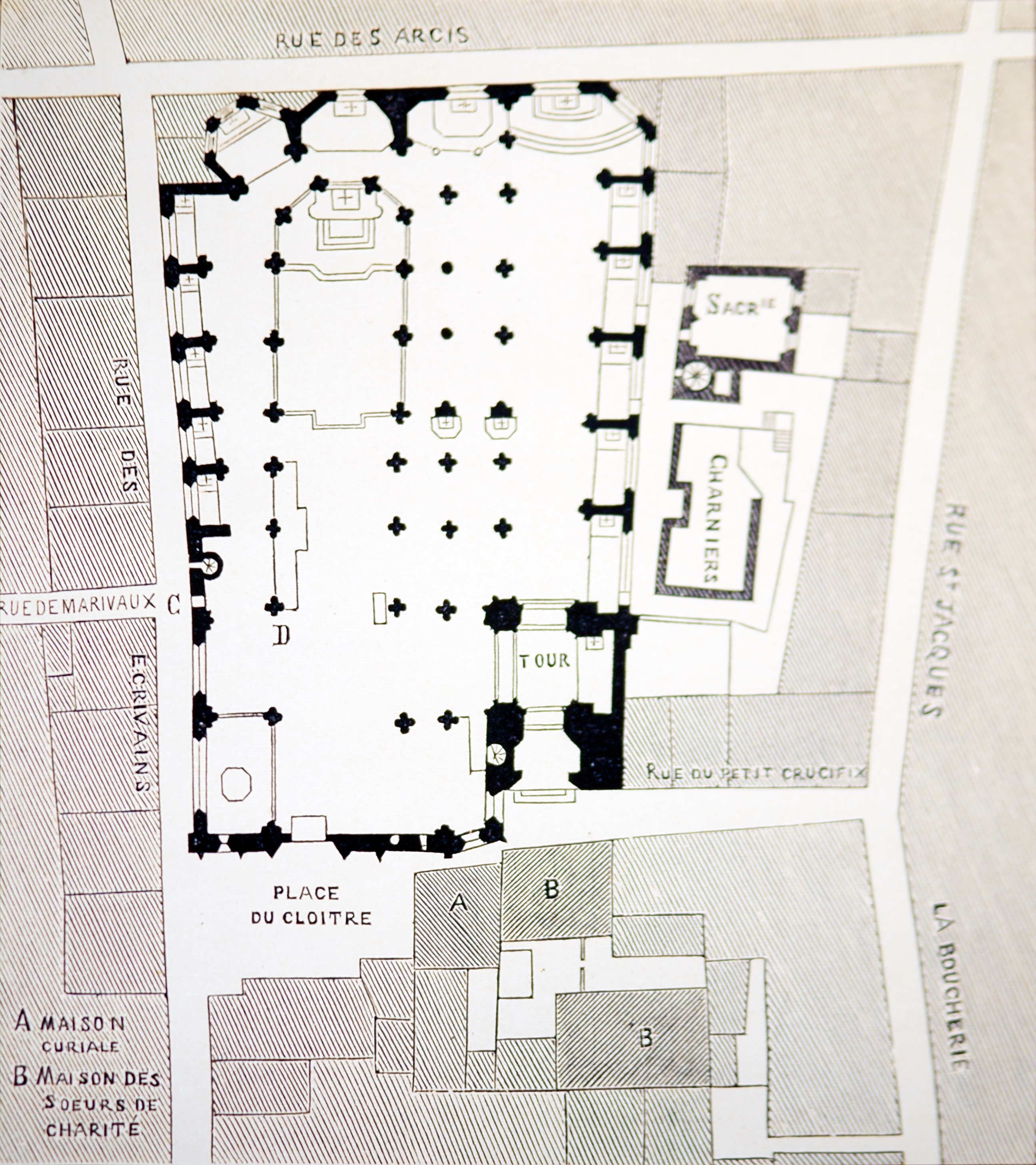 Plan de l'église Saint-Jacques-la-Boucherie au XVIIIe siècle d'après l'abbé Villain, Paris.